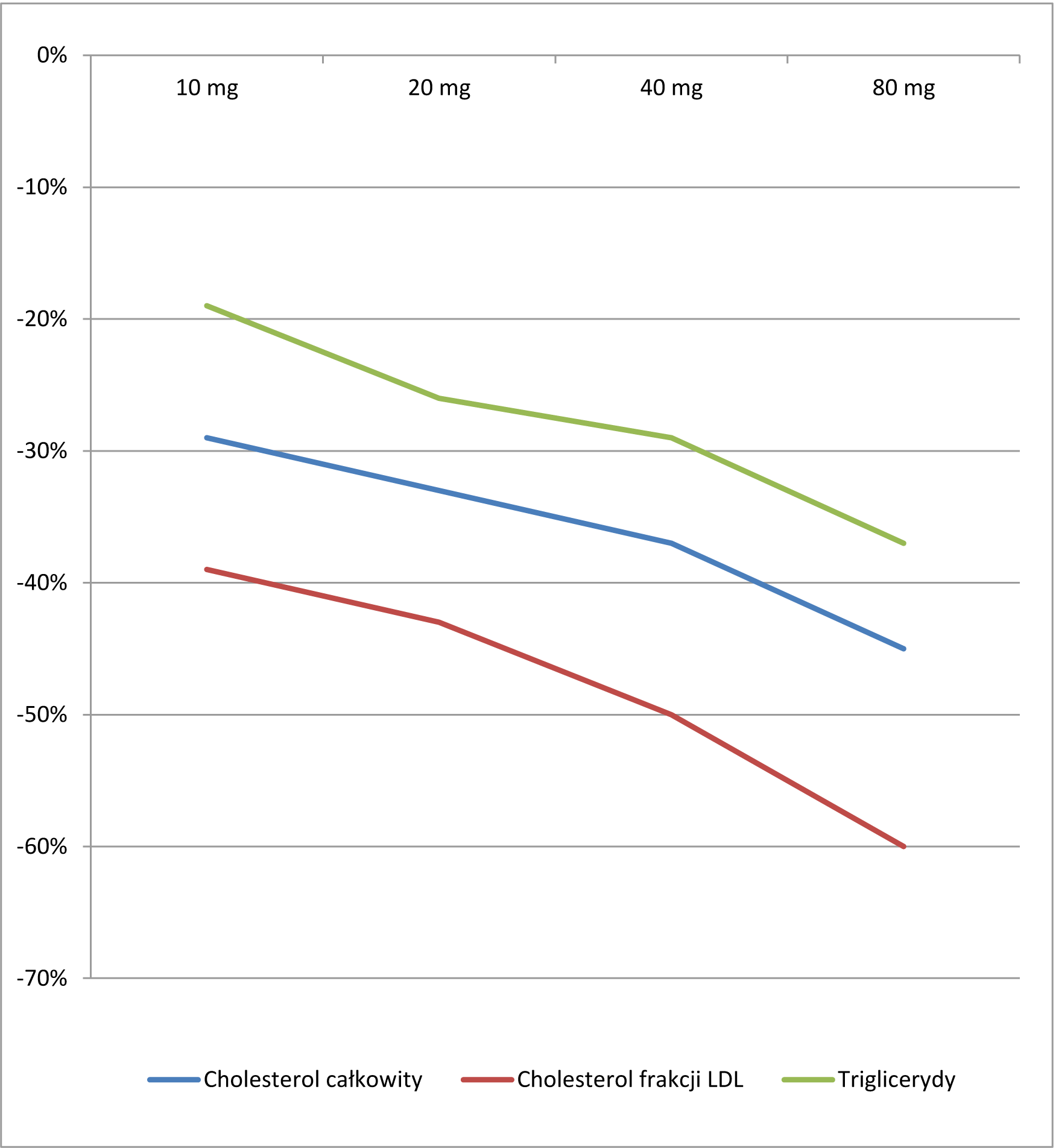 Wpływ atorwastatyny na wskaźniki lipidowe (dane do wykresu za LIPITOR® (atorvastatin calcium) Tablets for oral administration)